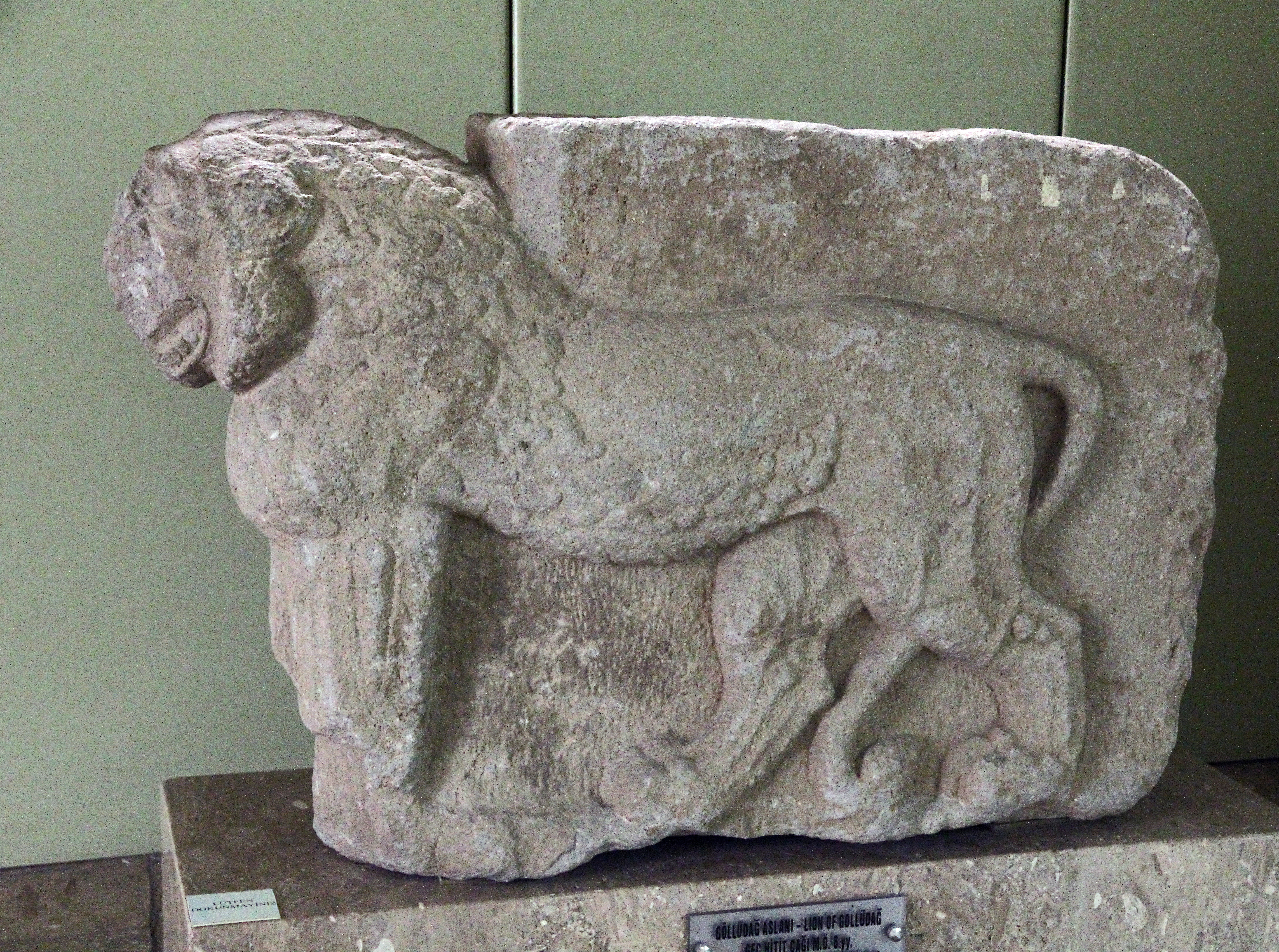 Archäologisches Museum Niğde, Türkei, Portallöwe aus Göllüdağ